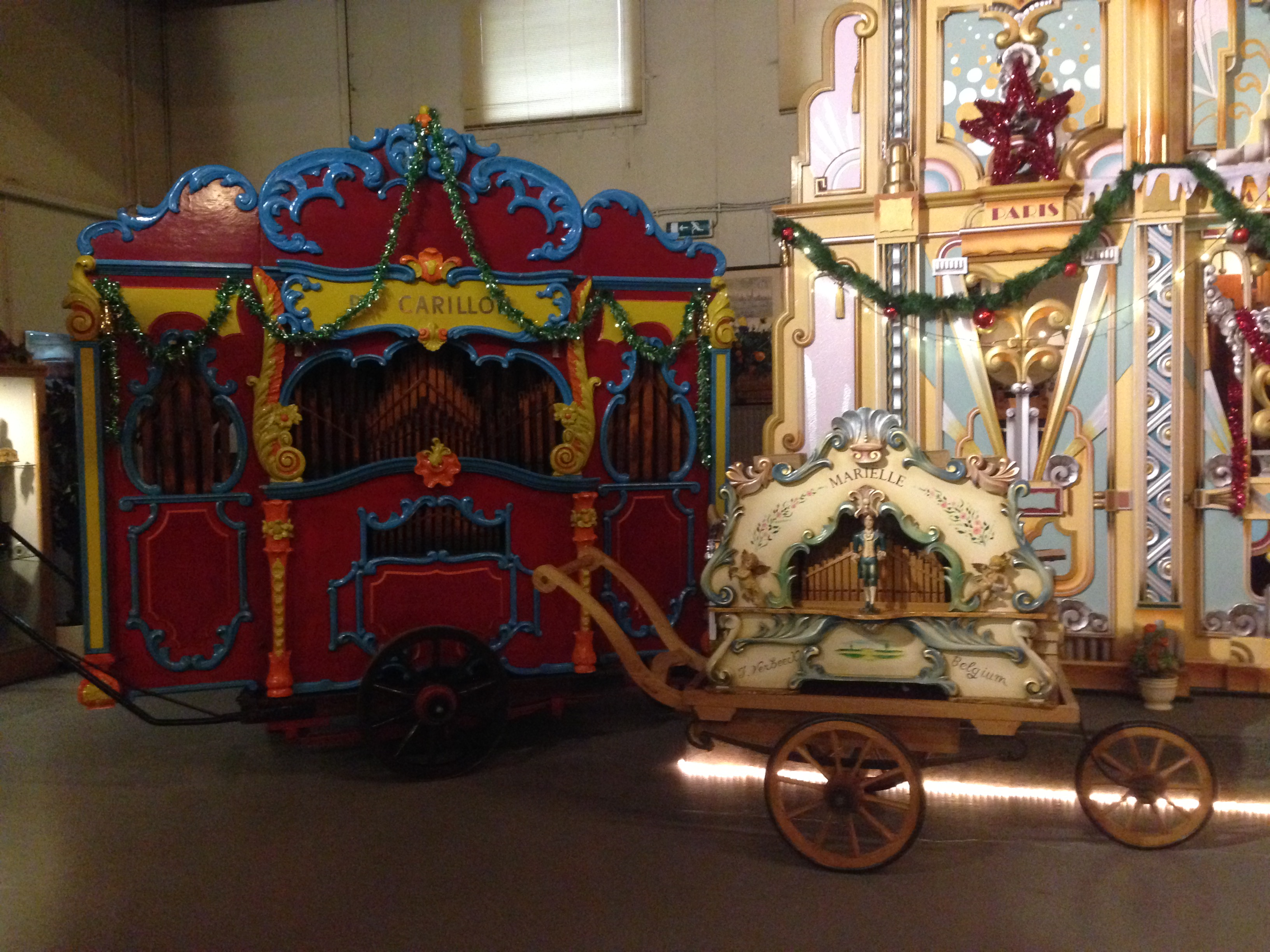 Draaiorgelmuseum, Haarlem, Netherlands